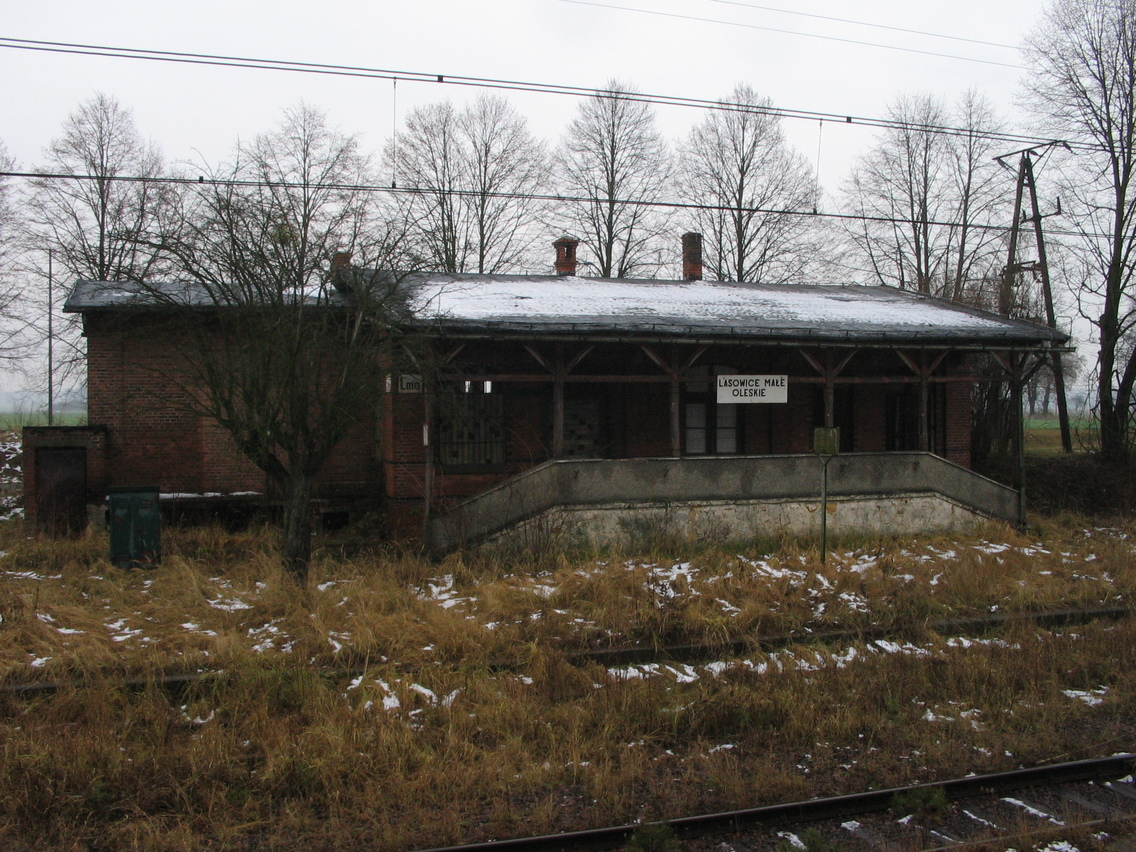 budynek stacji Lasowice Małe Oleskie